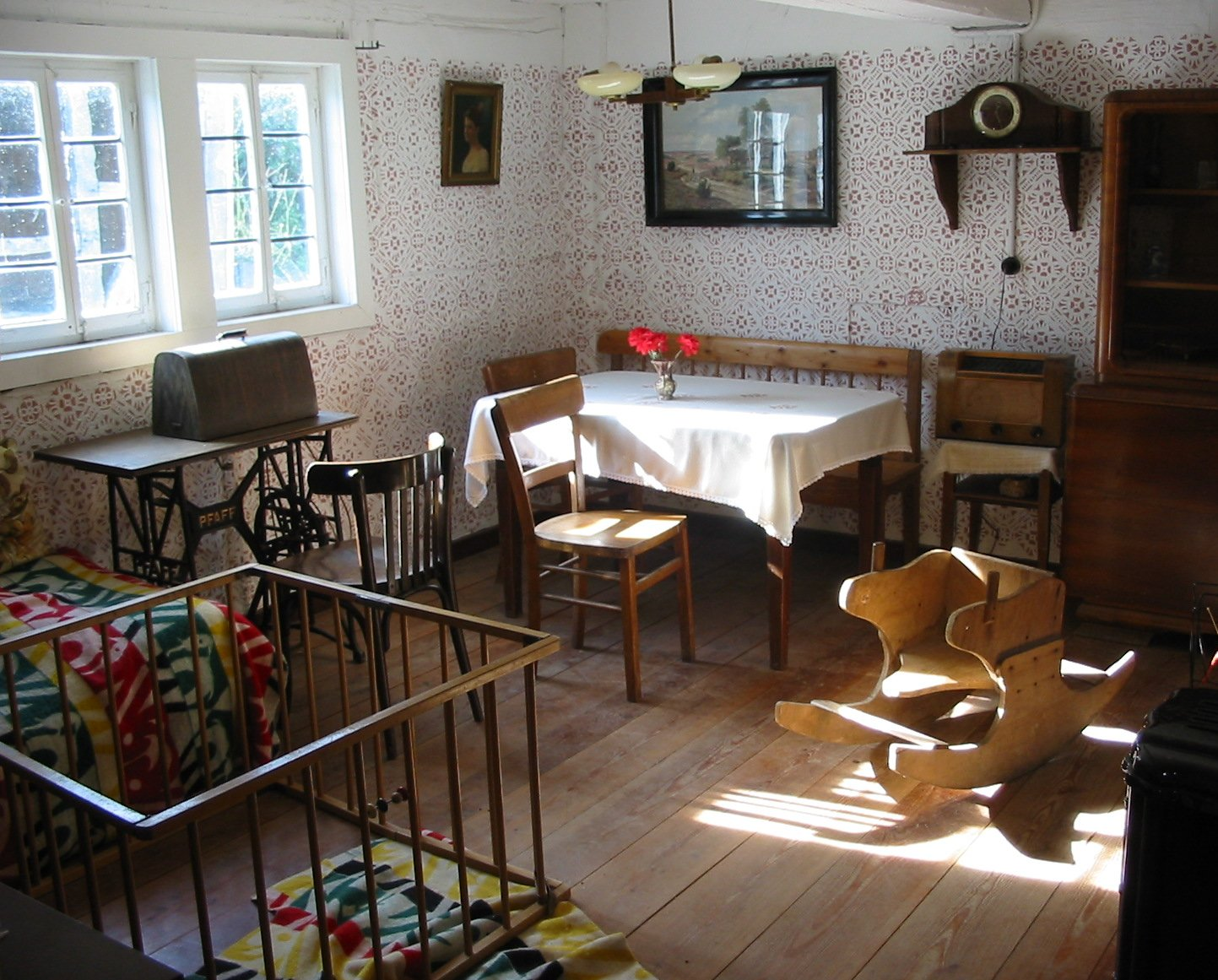 Beschreibung: Bild aus dem Hunsrückdorf im Roscheider Hof Quelle: LoKiLeCh Fotograf oder Zeichner: LoKiLeCh Datum: Mai 2005